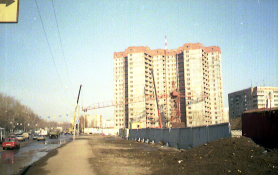 Демонтаж крана КБ-676 - Этап снятия балочной стрелы (автокранами КАТО и BUMAR-Январец) - Новосибирск, 1997